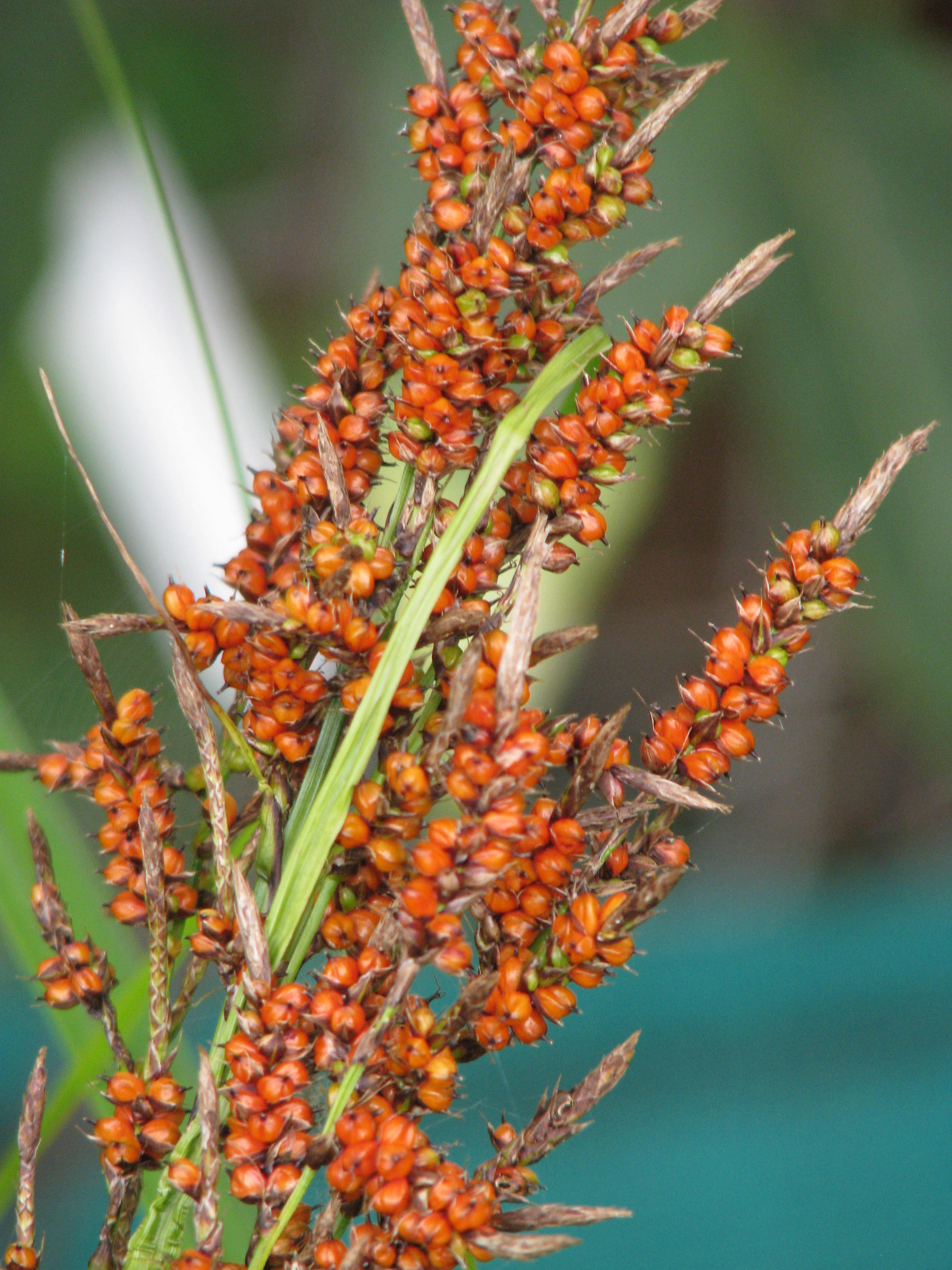 Carex baccans